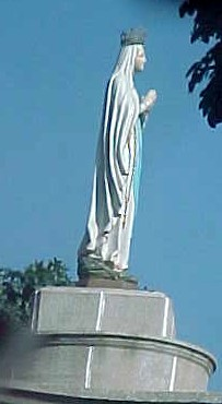 Maiquetia en el estado Vargas - Venezuela a un año de del deslave de diciembre de 1999 (2000)